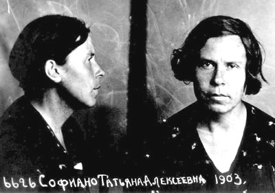 Татьяна Алексеевна Софиано в тюрьме НКВД СССР (на Лубянке находилась в 1937-1938 годах). Фото из архива А.Д. Сахарова.